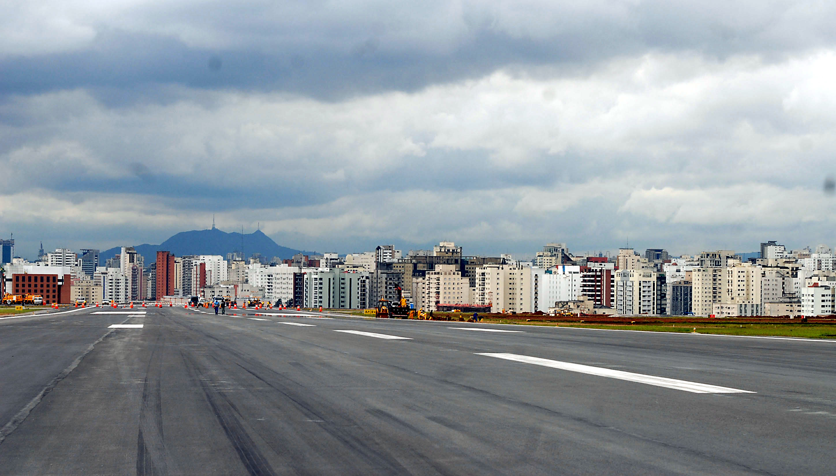 São Paulo - Vista da pista principal do Aeroporto de Congonhas, na qual tentou pousar o Airbus A320 da TAM no acidente do dia 17